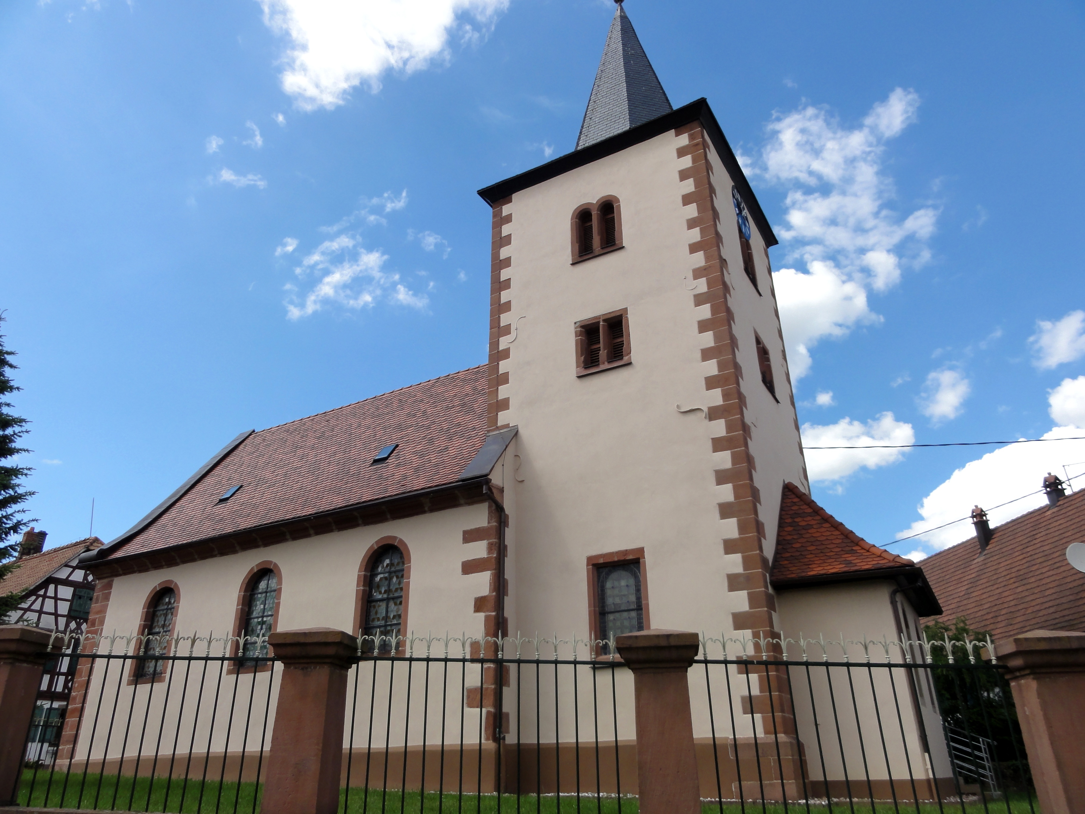 Alsace, Bas-Rhin, Buswiller, Église protestante Saint-Sixte (XVIIe-XIXe): .